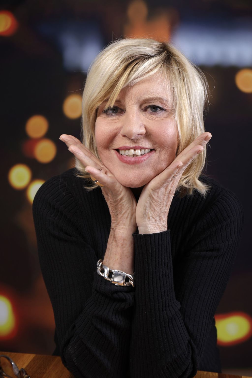 Profil Chantal Ladesou